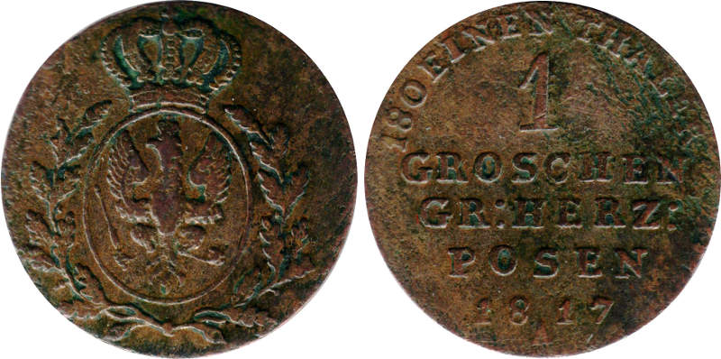 1 grosz 1817 A